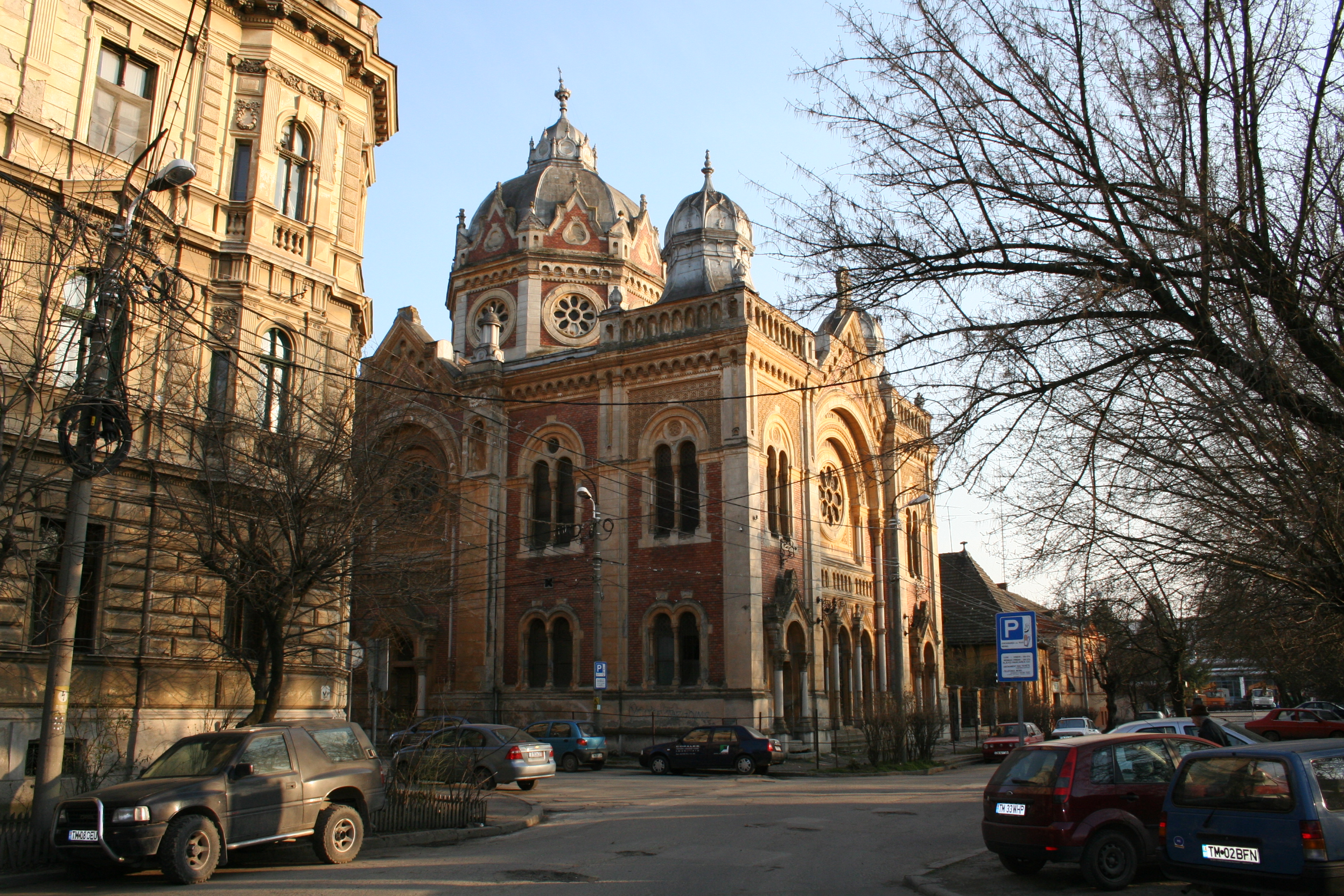 Sinagoga din cartierul Fabric, Timişoara.